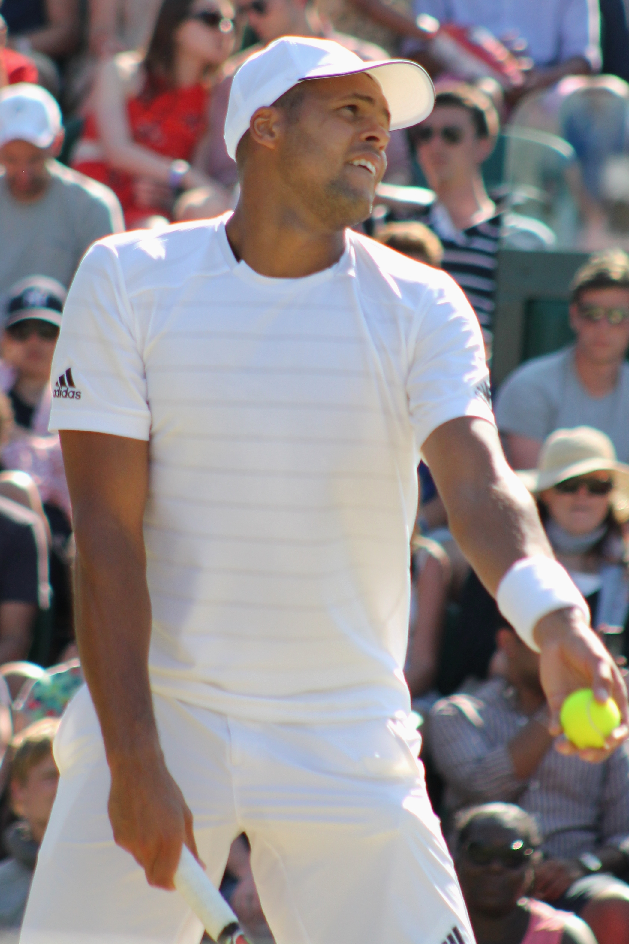 Tsonga WM15 (14)